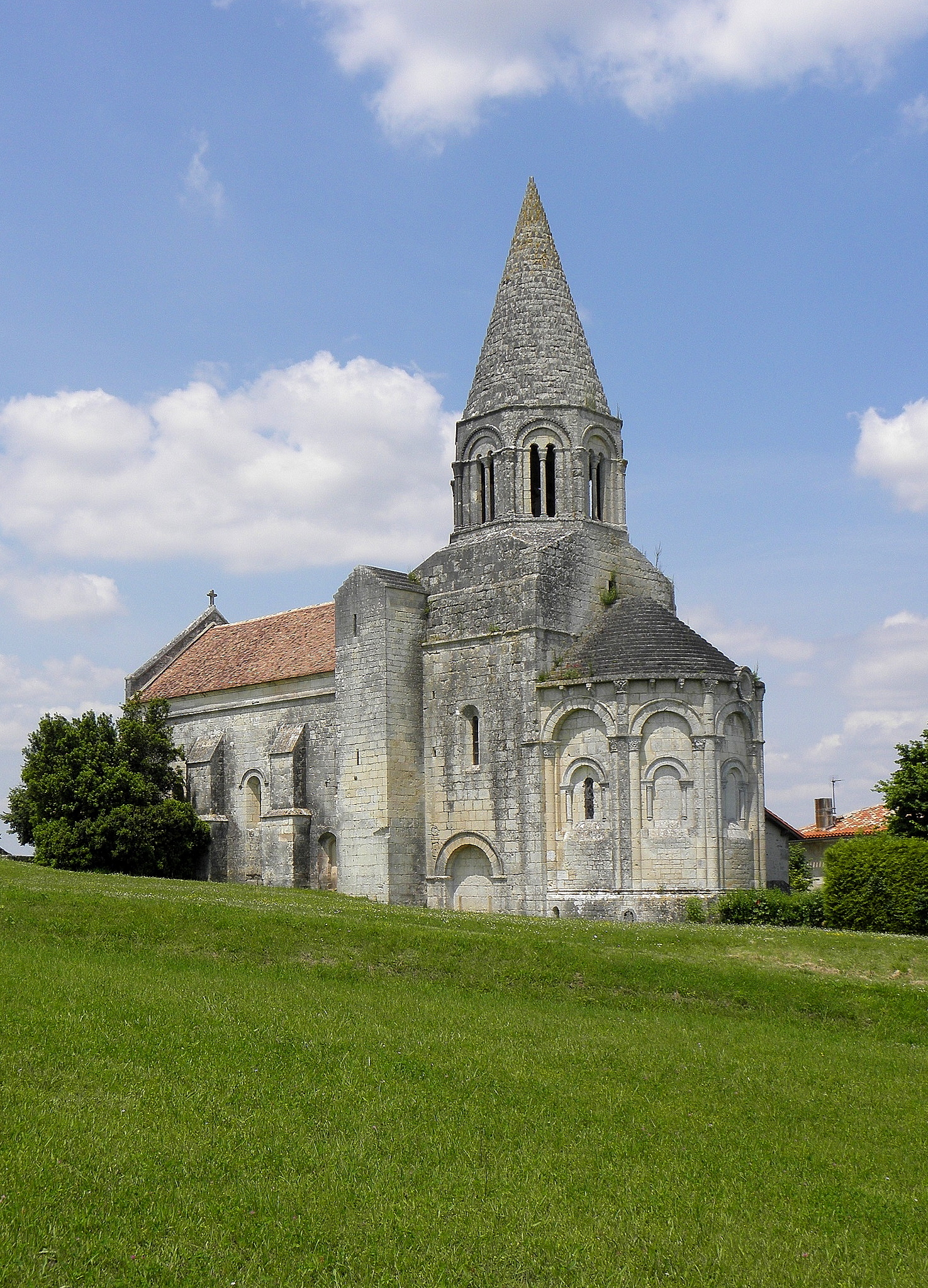 Église Saint-Cybard de Plassac, commune de Plassac-Rouffiac (16). Chevet et flanc sud.